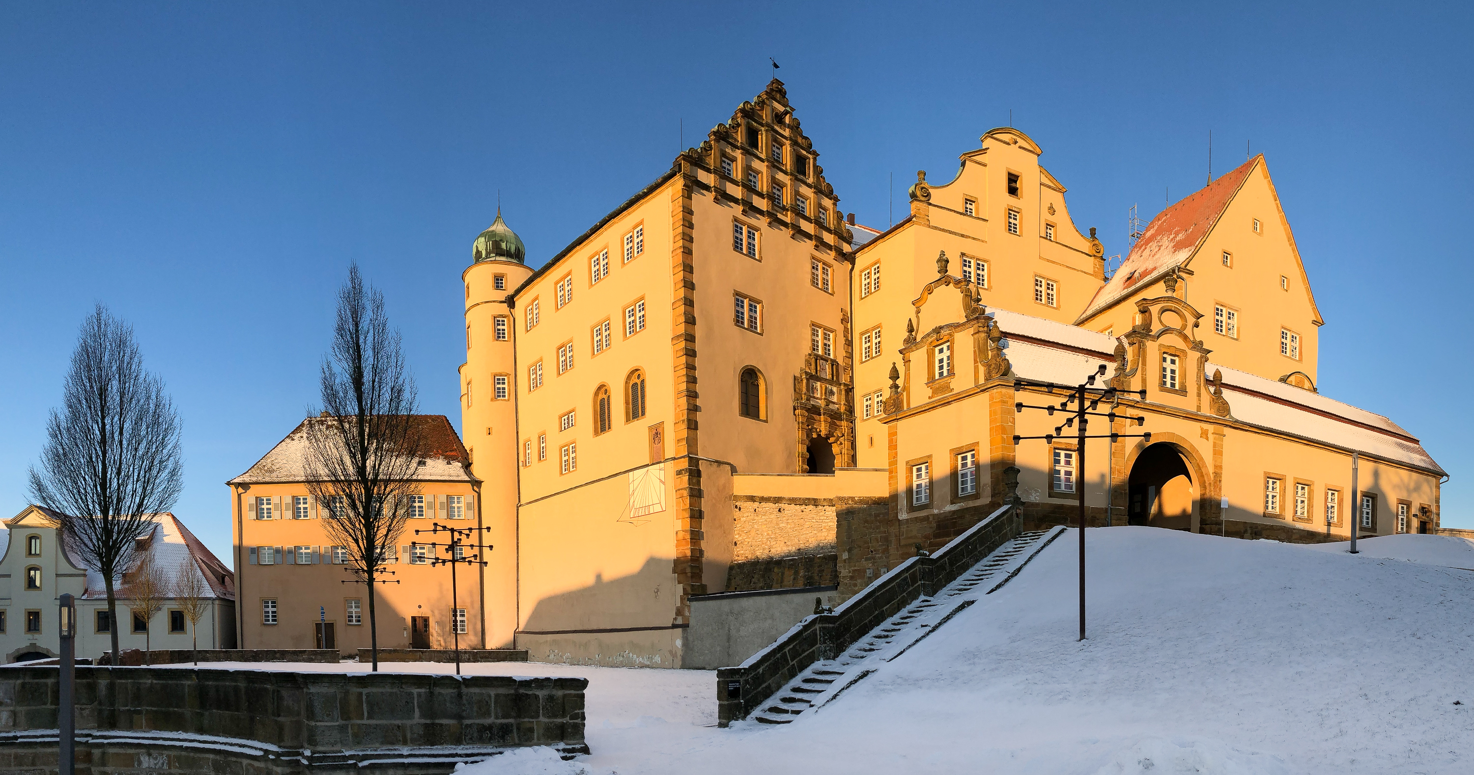 Kapfenburg bei Lauchheim, Ostalbkreis, Baden-Württemberg. Panoramaaufnahme von innerhalb der Umfassungsmauern